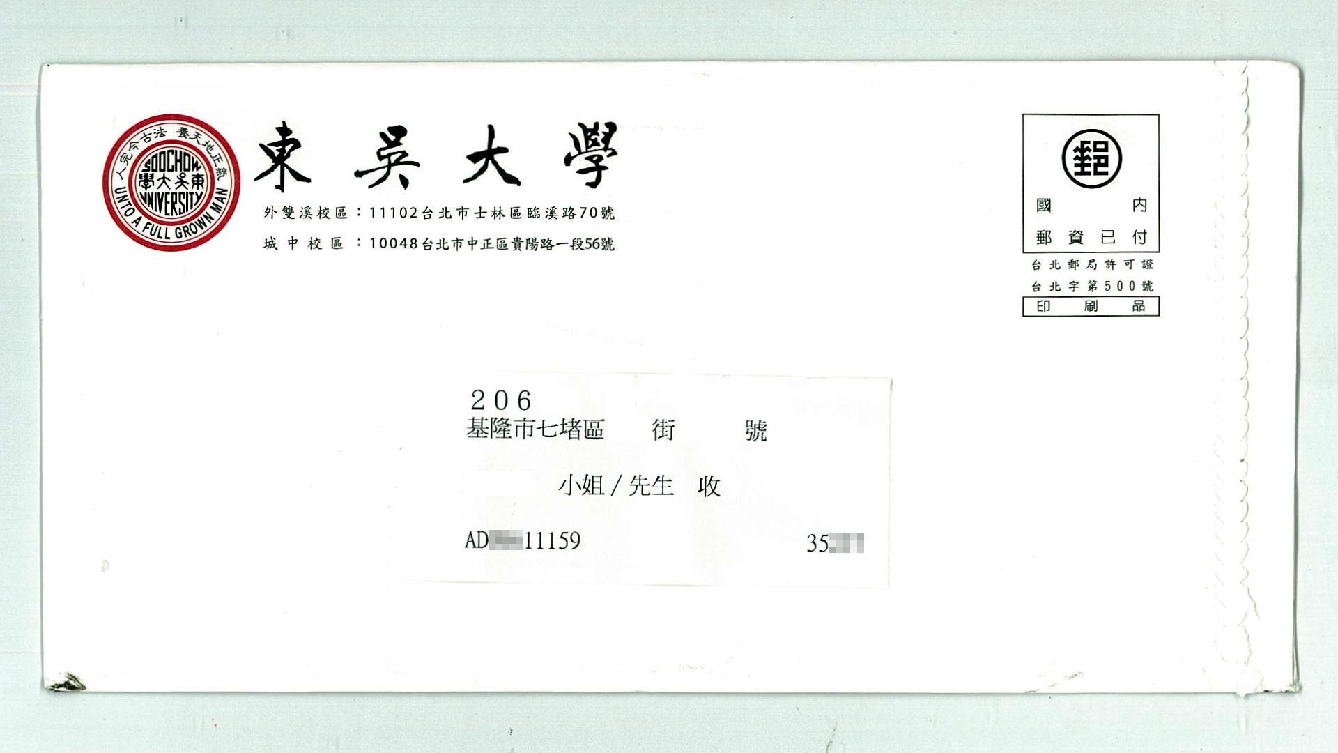 2015年東吳大學信封。